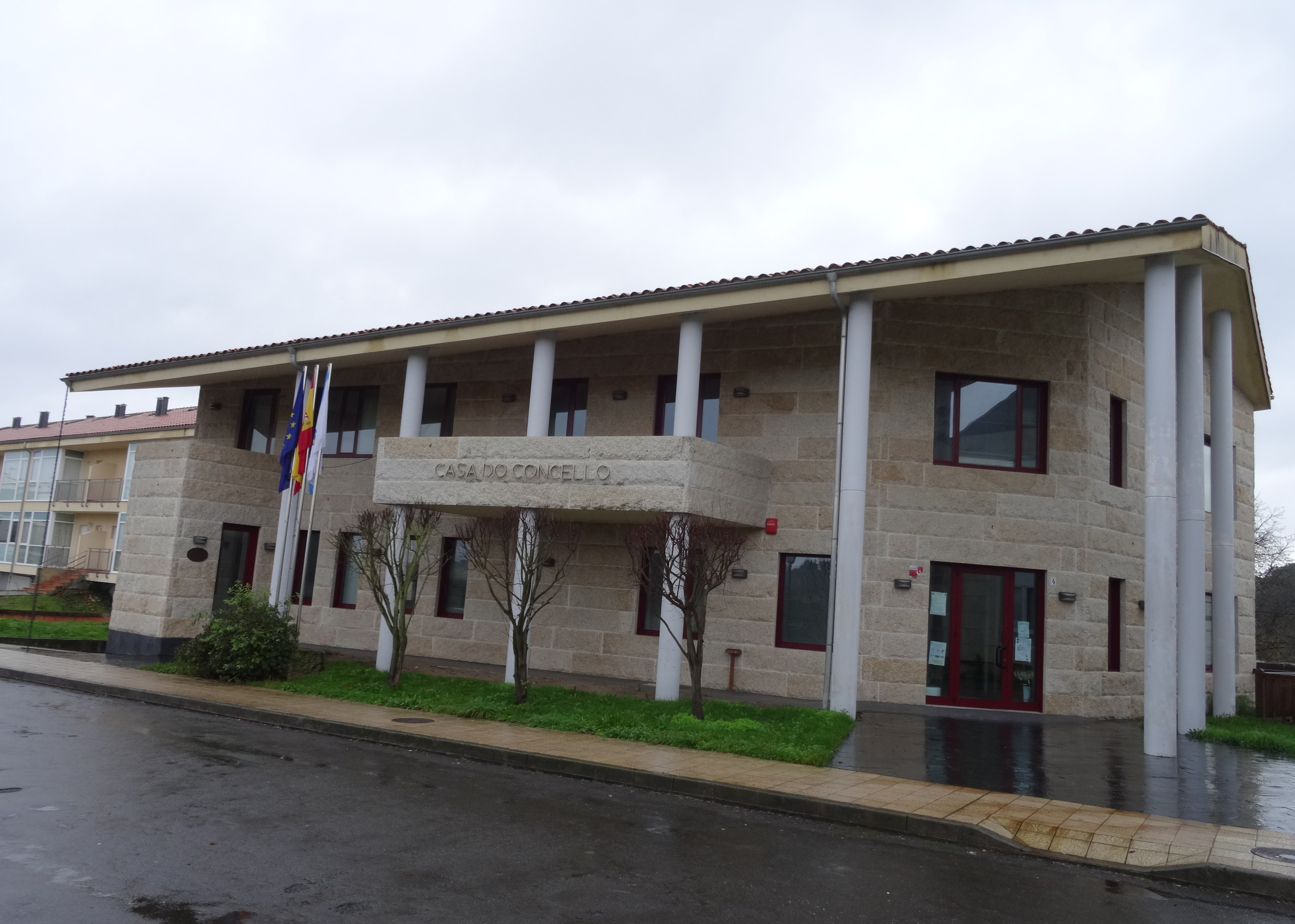 Casa do concello, Carballeda de Avia.